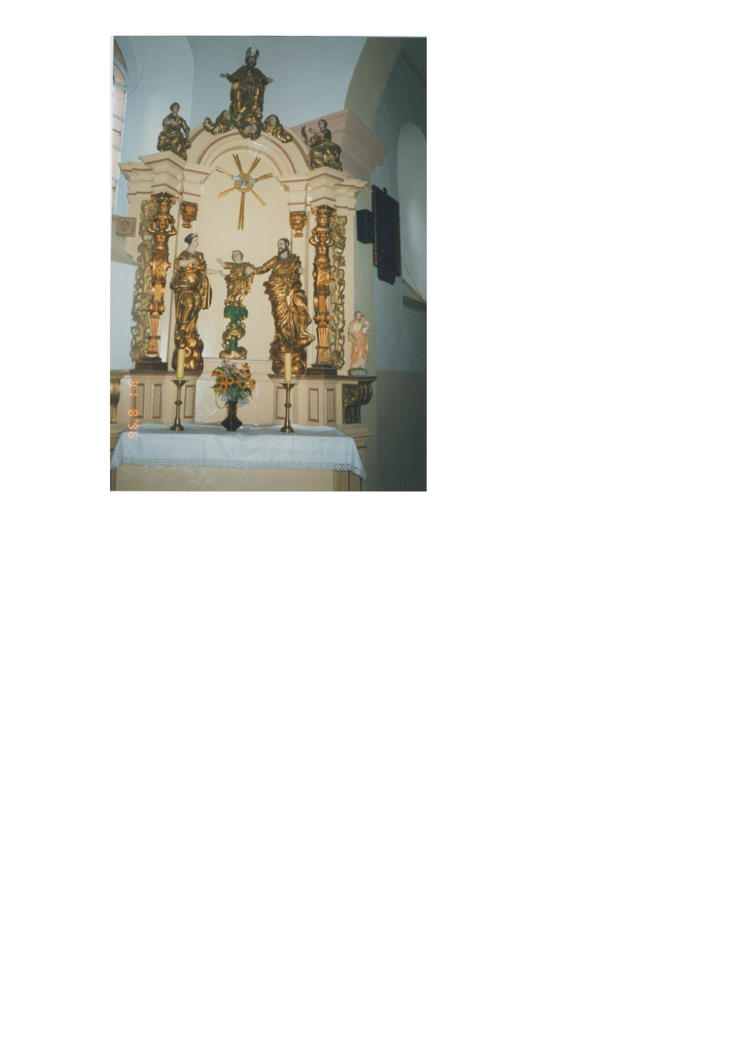 Kościół św. Marcina w Grębocicach